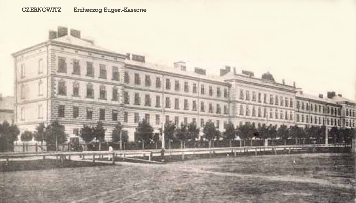 k.u.k. Infanteriekaserne in Czernowitz